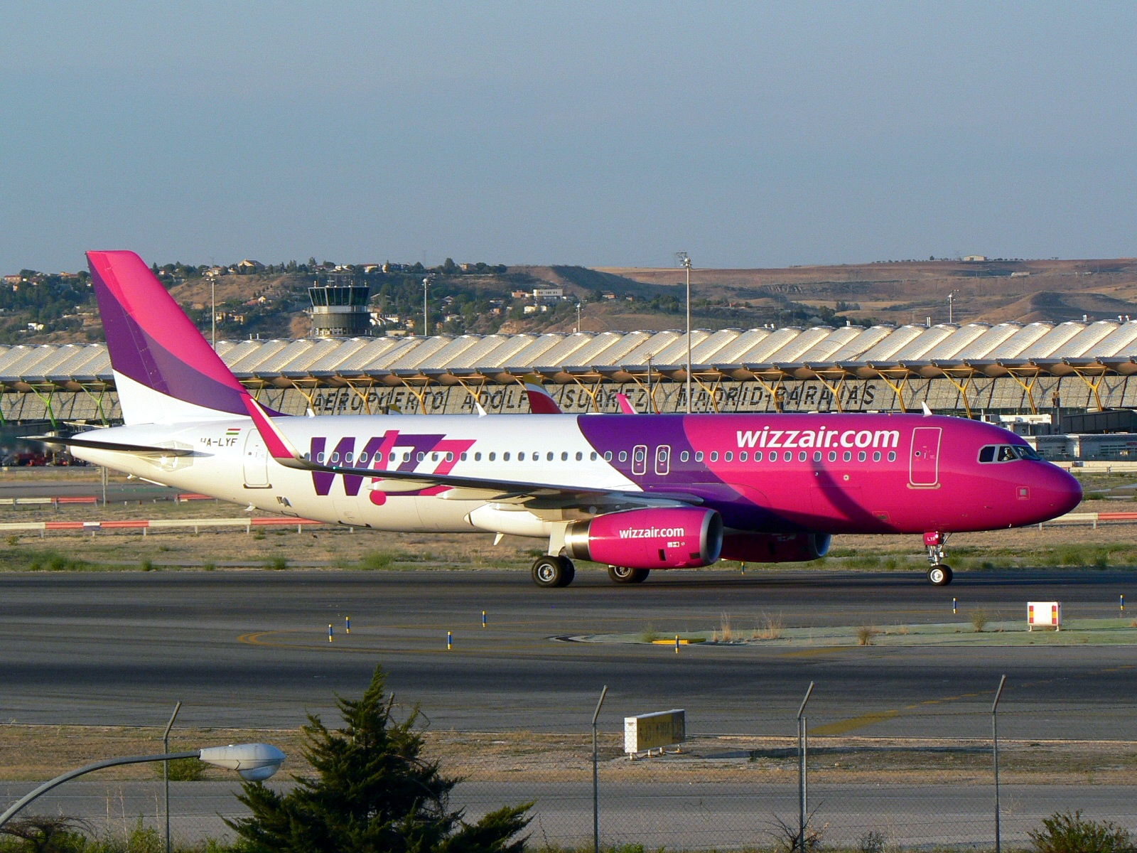 Airbus A320-232 (HA-LYF) de Wizz Air en el aeropuerto Adolfo Suárez Madrid-Barajas.